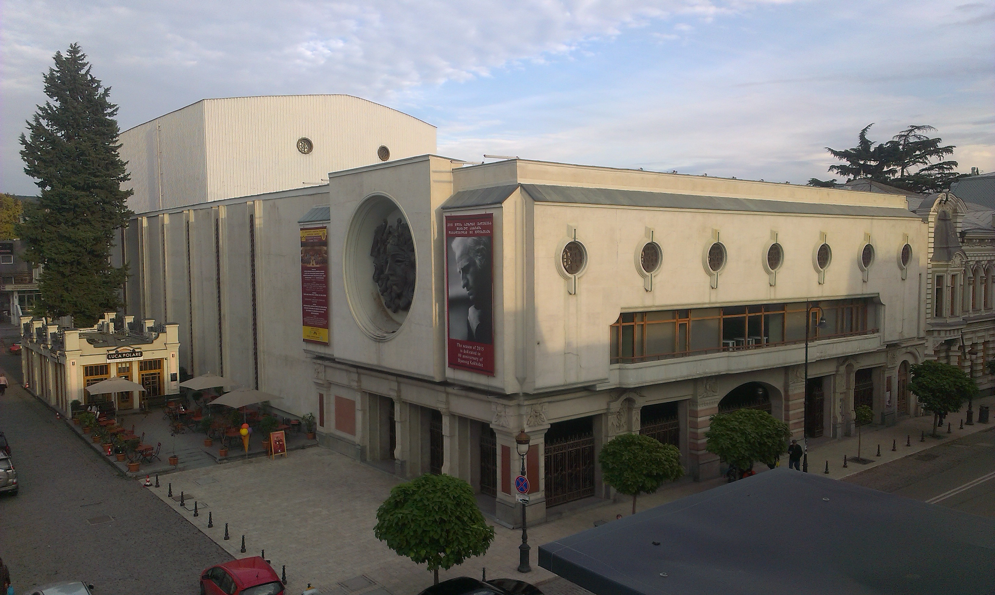 Проспект Давида Агмашенебели. Государственный центр музыки Грузии